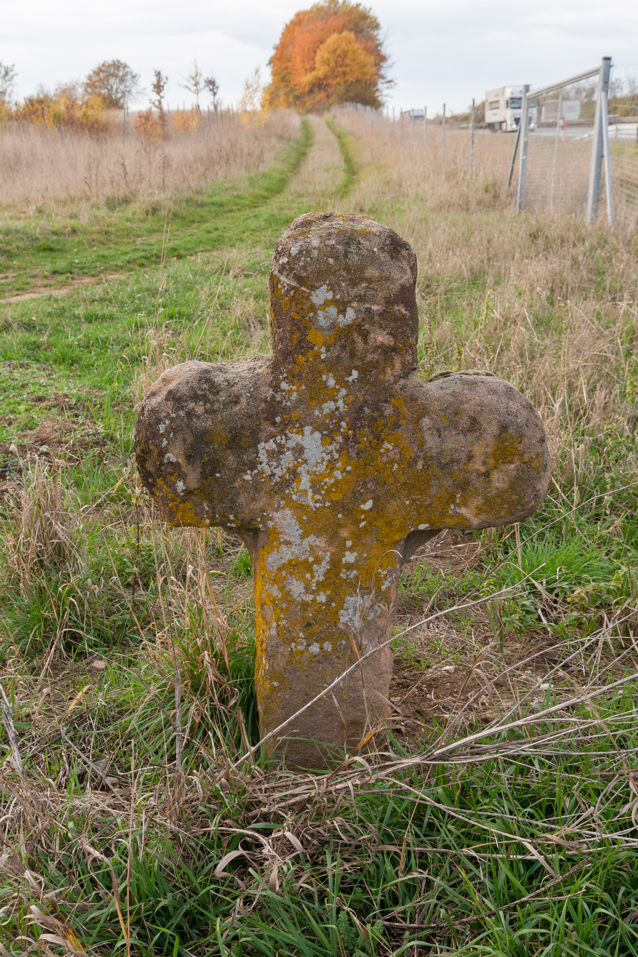 Steinkreuz, Sühnekreuz, Altdorf bei Nürnberg, Rasch, Sicht von Osten nach Westen